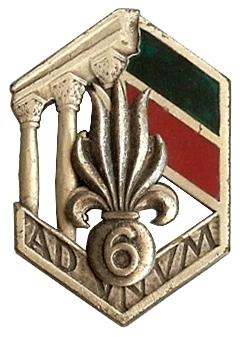 Insigne du 6° régiment étranger d'infanterie. Type 2. Fabrication artisanale au Levant